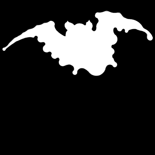 「蝙蝠」紋（染抜）